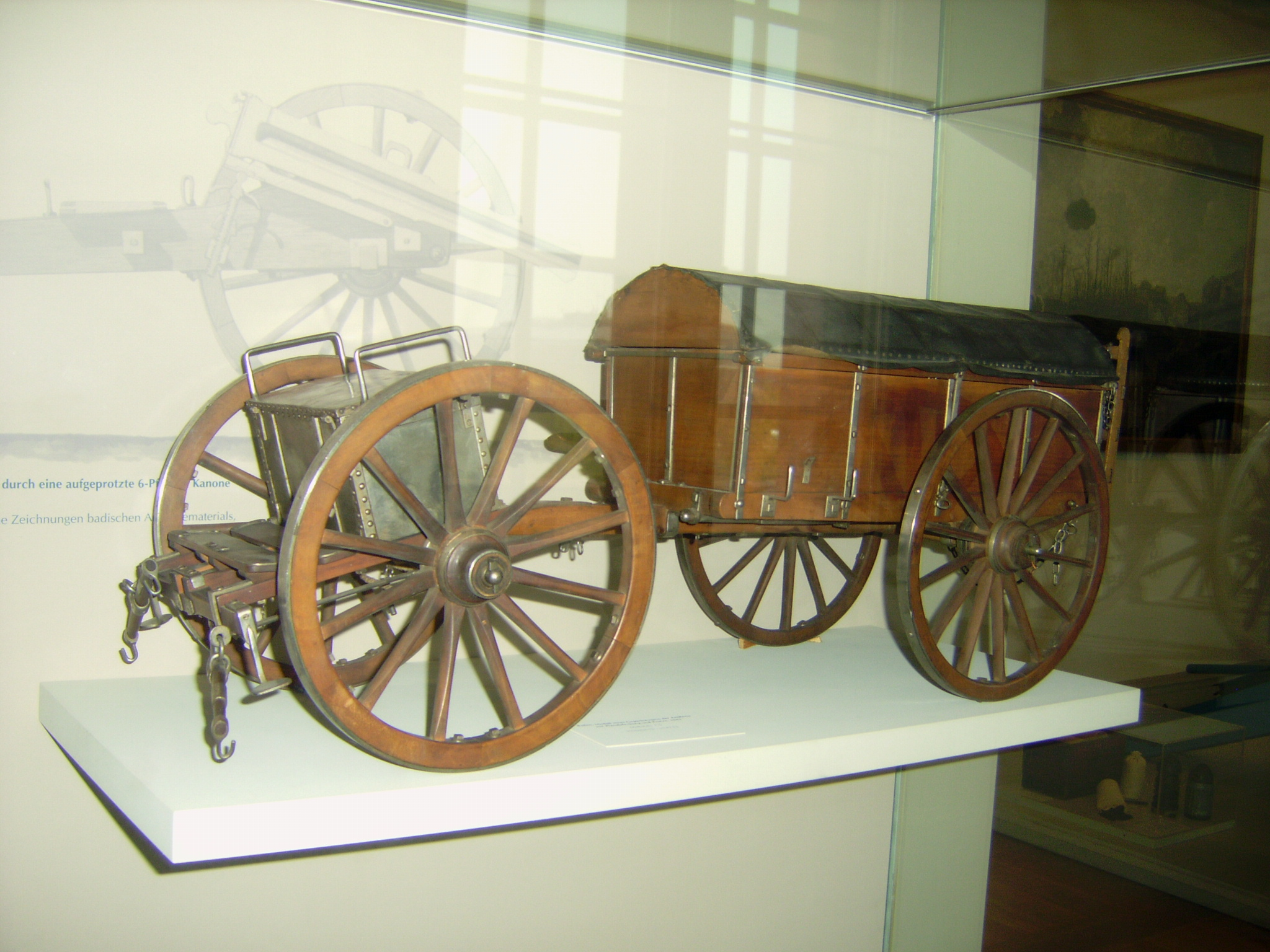 Modell eines Munitionswagens an Protze